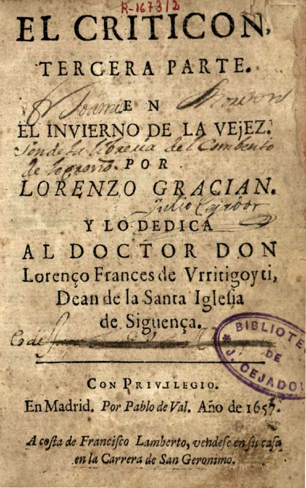 Edición princeps de la tercera parte de El Criticón de Baltasar Gracián: EL CRITICÓN./ TERCERA PARTE./ EN/ EL INVIERNO DE LA VEJEZ./ POR/ LORENZO GRACIÁN./ Y LO DEDICA/ AL DOCTOR DON/ Lorenço Frances de Vrritigoyti,/ Dean de la Santa Iglesia/ de Siguença. / CON PRIVILEGIO./ En Madrid. Por Pablo de Val. Año 1657./ A costa de Francisco Lamberto, véndese en su casa/en la Carrera de San Jerónimo.